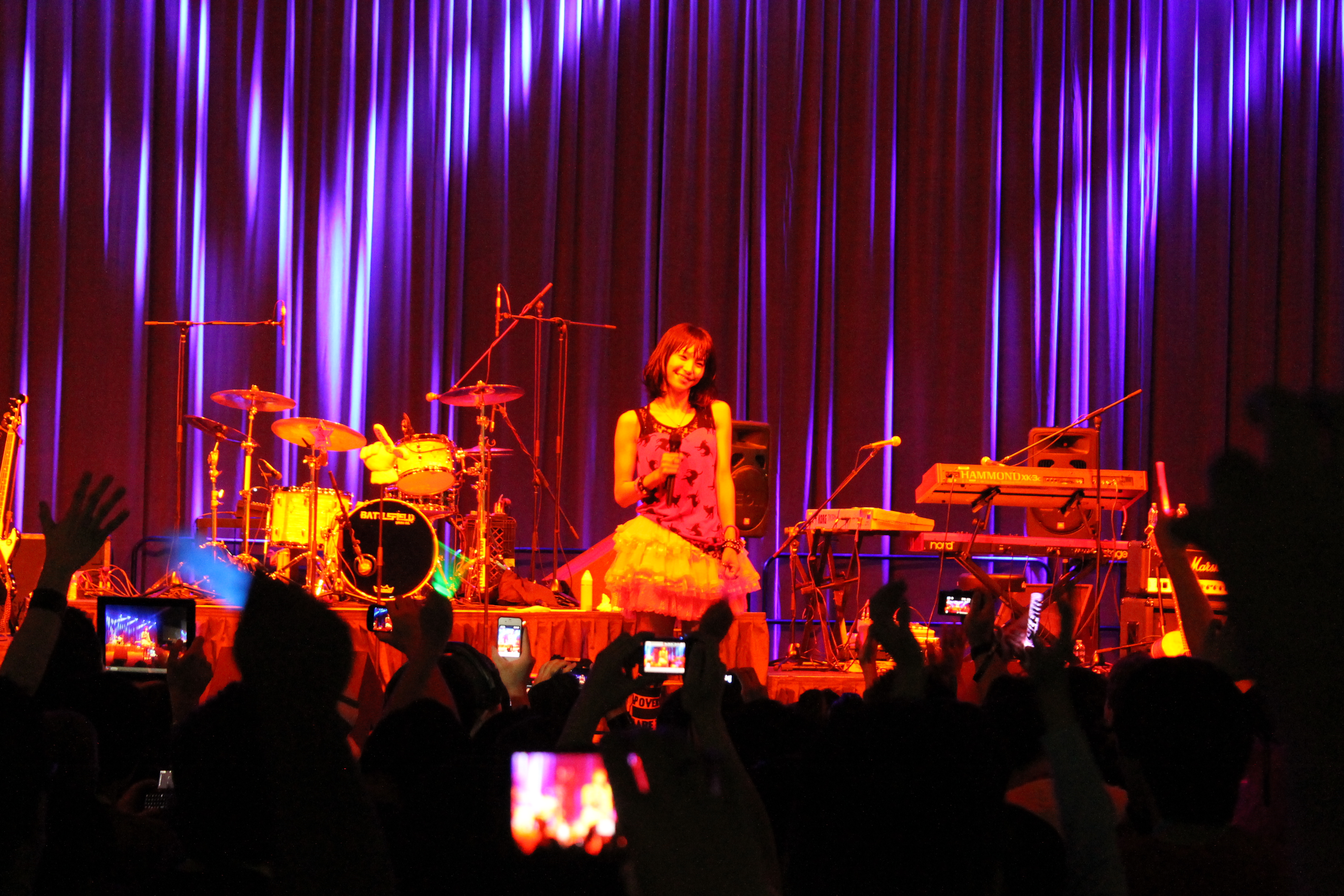 Anime Expo 2012 0830